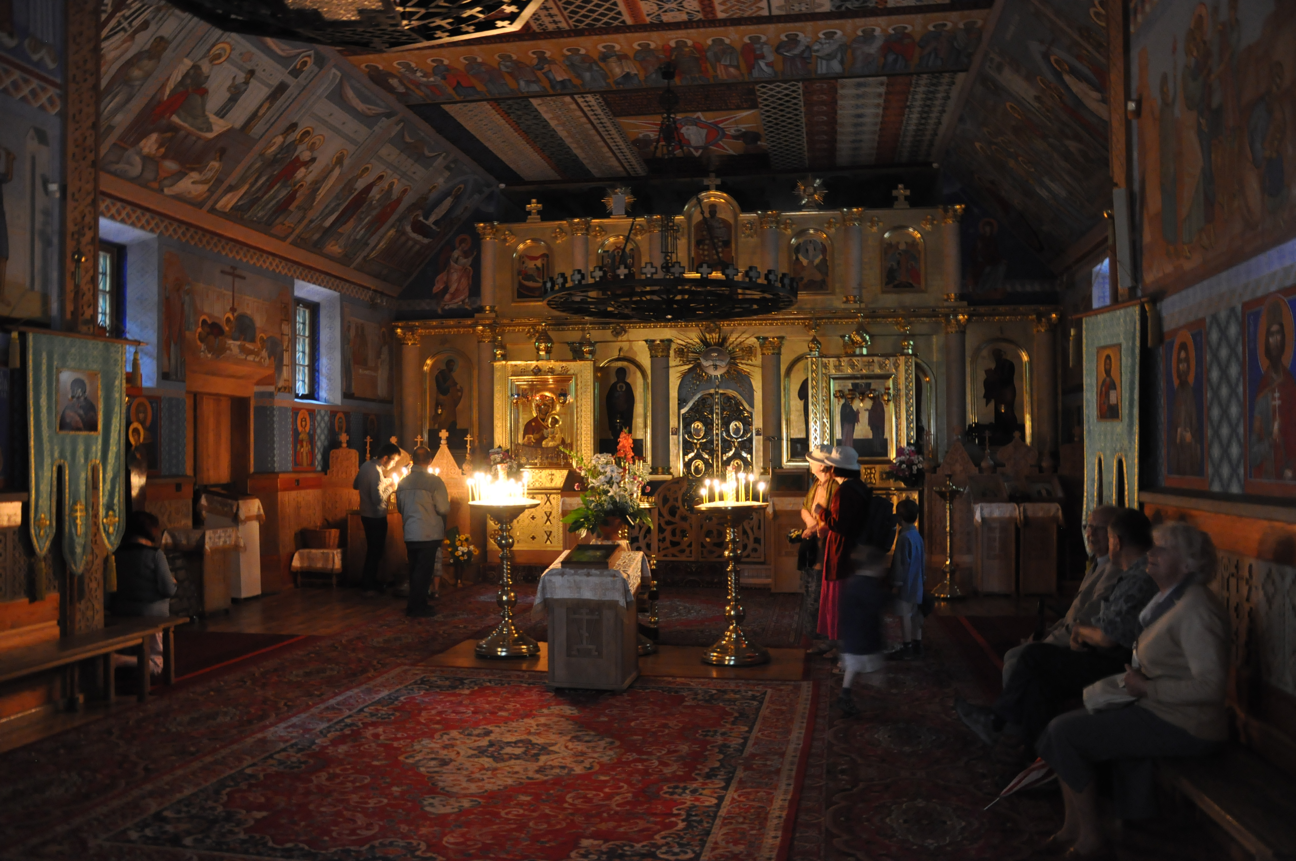 Cerkiew p.w. Przemienienia Pańskiego, w zespole klasztornym prawosławnym, drewn., 1991-1994 wnętrze